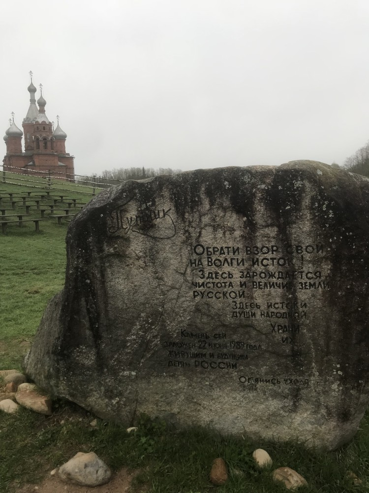 Памятный камень на Истоке Волги